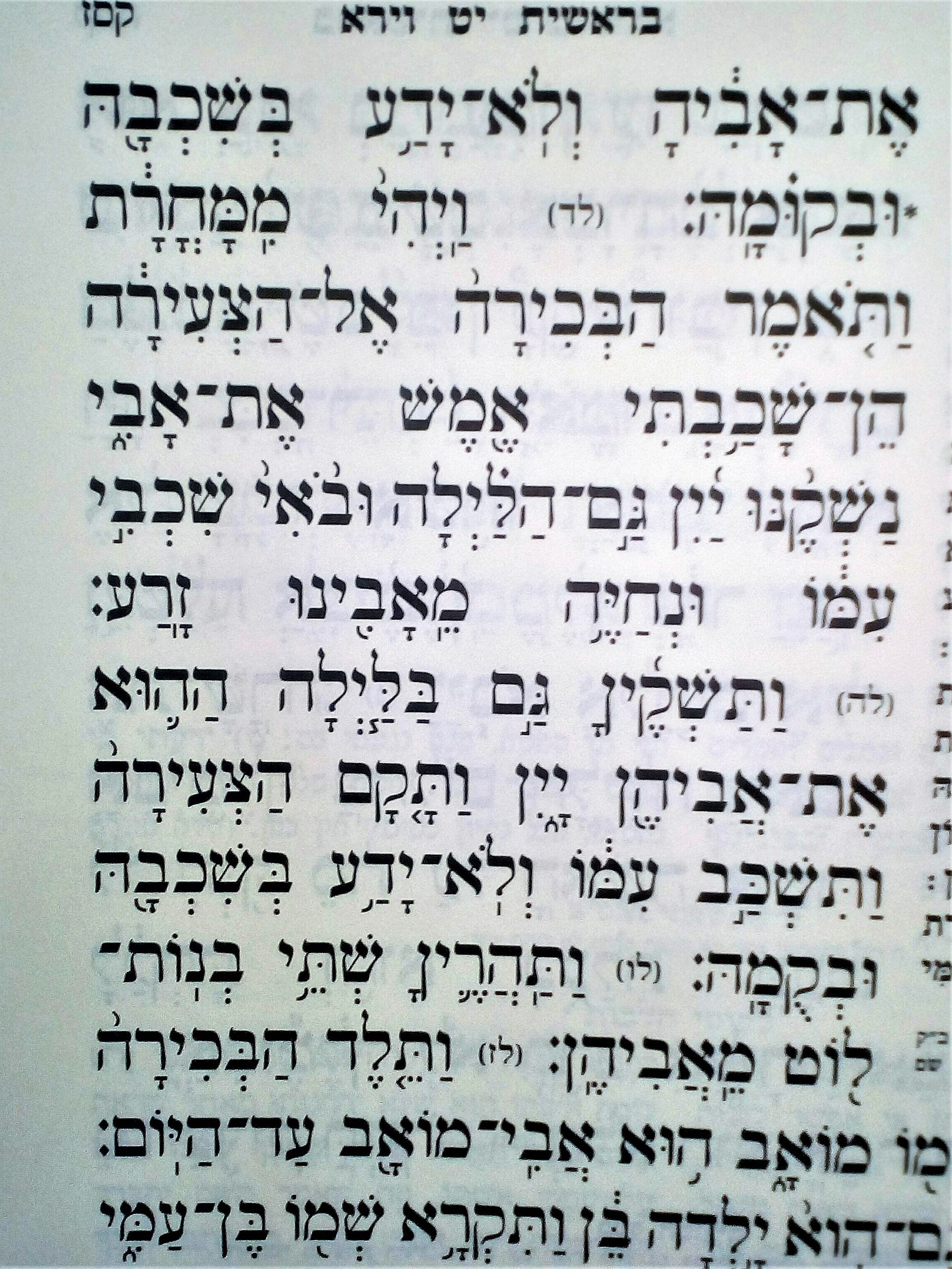 המחשה של המסורת לפיה יש להוסיף נקודה מעל האות ו' שבמילה 'ובקומה' כרמז לדרשה.